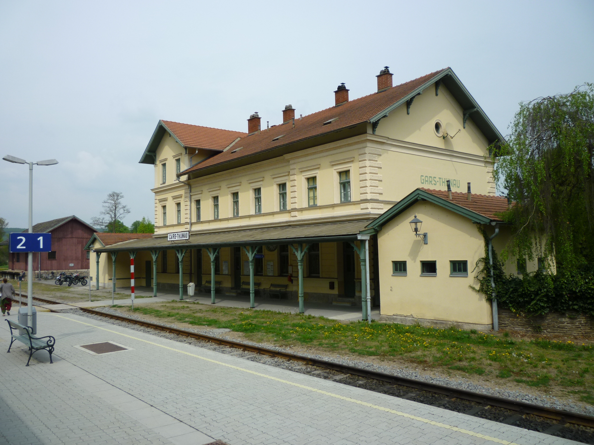 Kamptalbahn, Bahnhof Gars-Thunau, Niederösterreich, Österreich